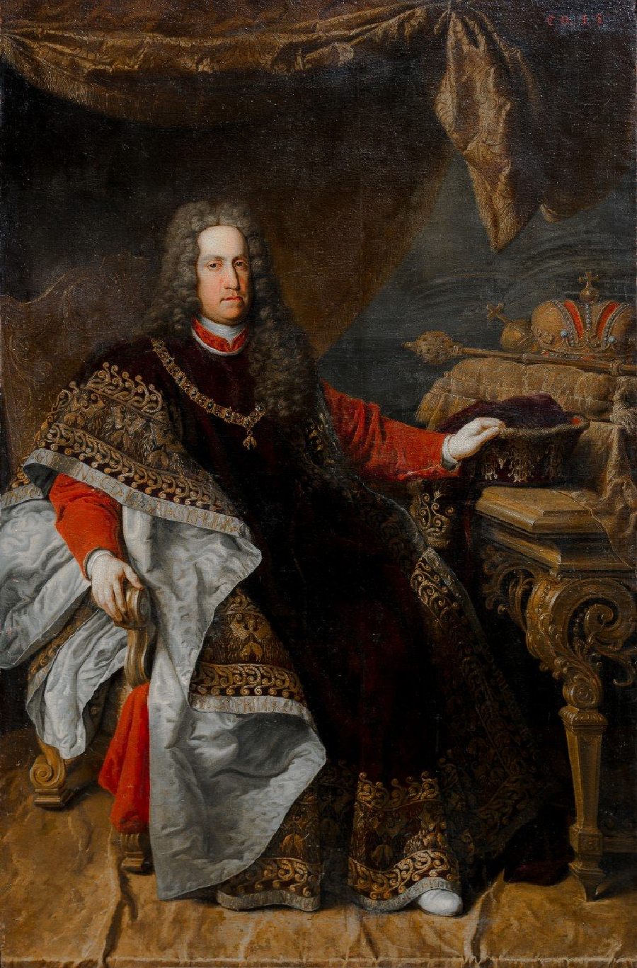 Portrait de Charles VI (1685-1740) en tenue de grand-Maitre de l'ordre de la Toison d'or